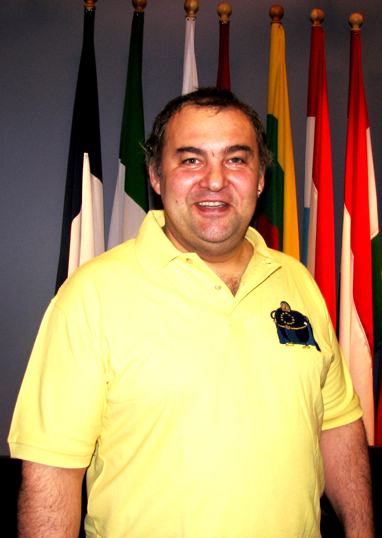 Emil Rutiku Euroopa Liidu Majas